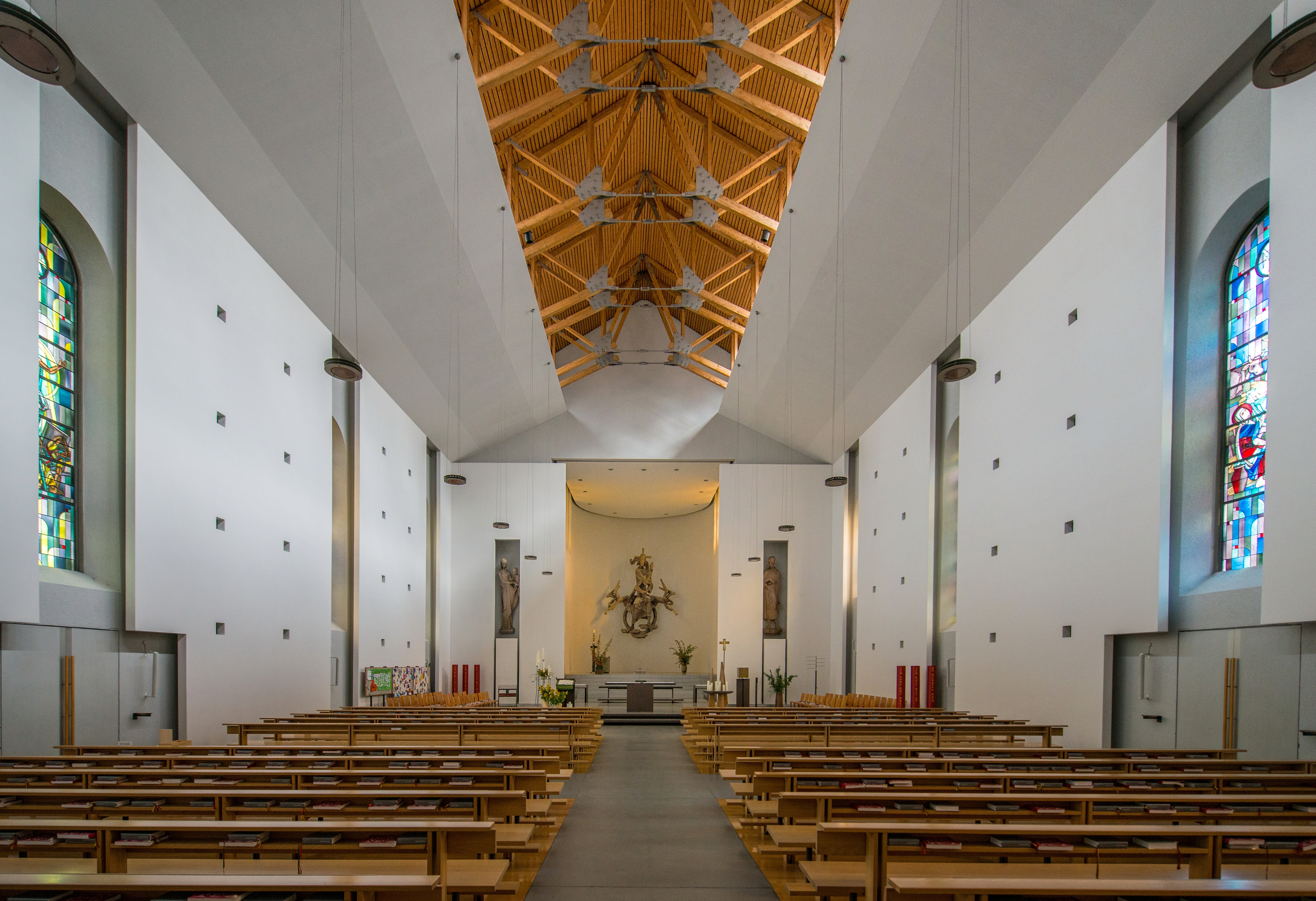 Pfarrkirche Hll. Peter und Paul, erbaut 1830 nach Plänen von Alois Negrelli in Lustenau, Vorarlberg.